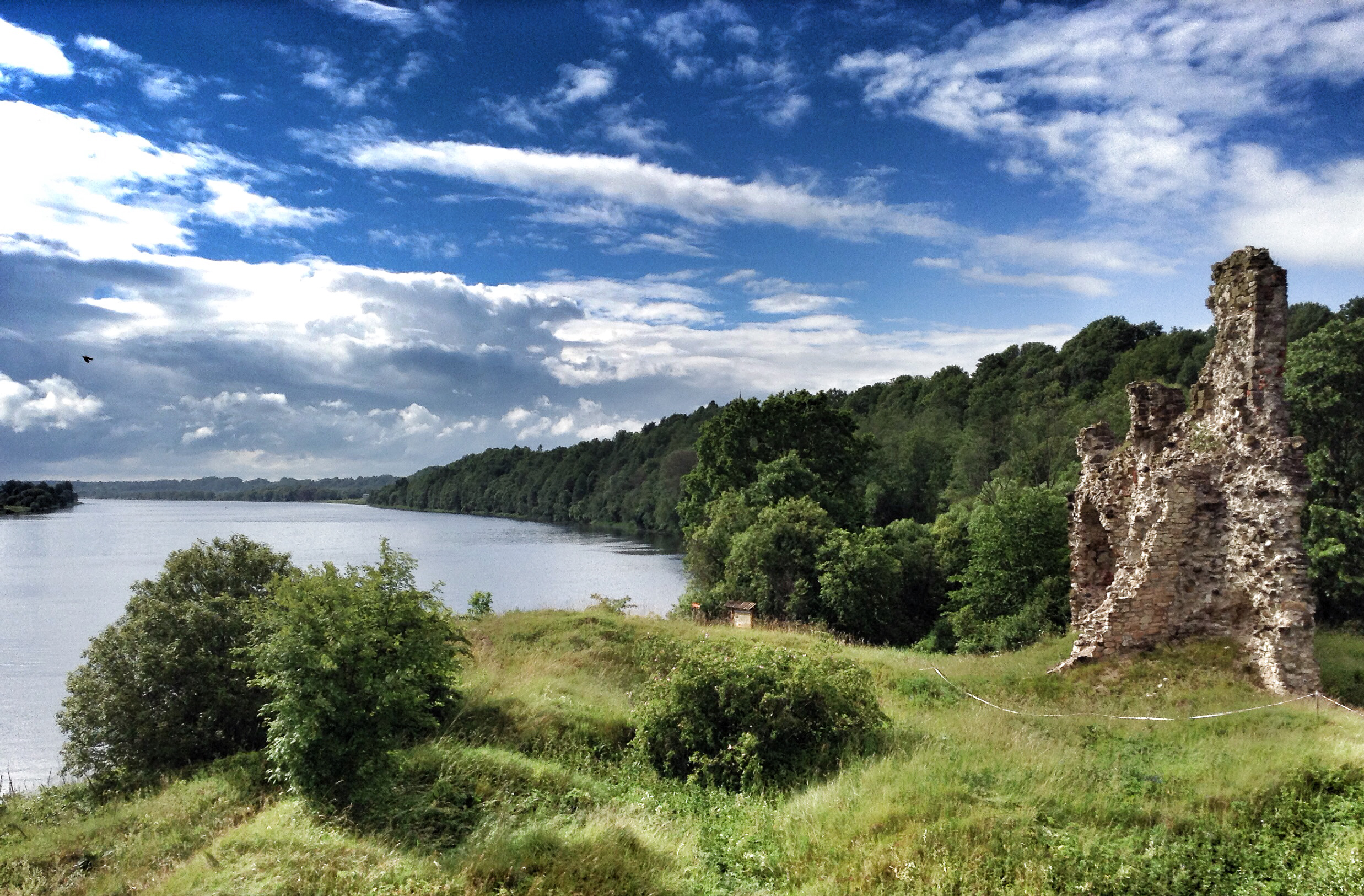 Aizkraukles viduslaiku pils, Aizkraukles pagasts